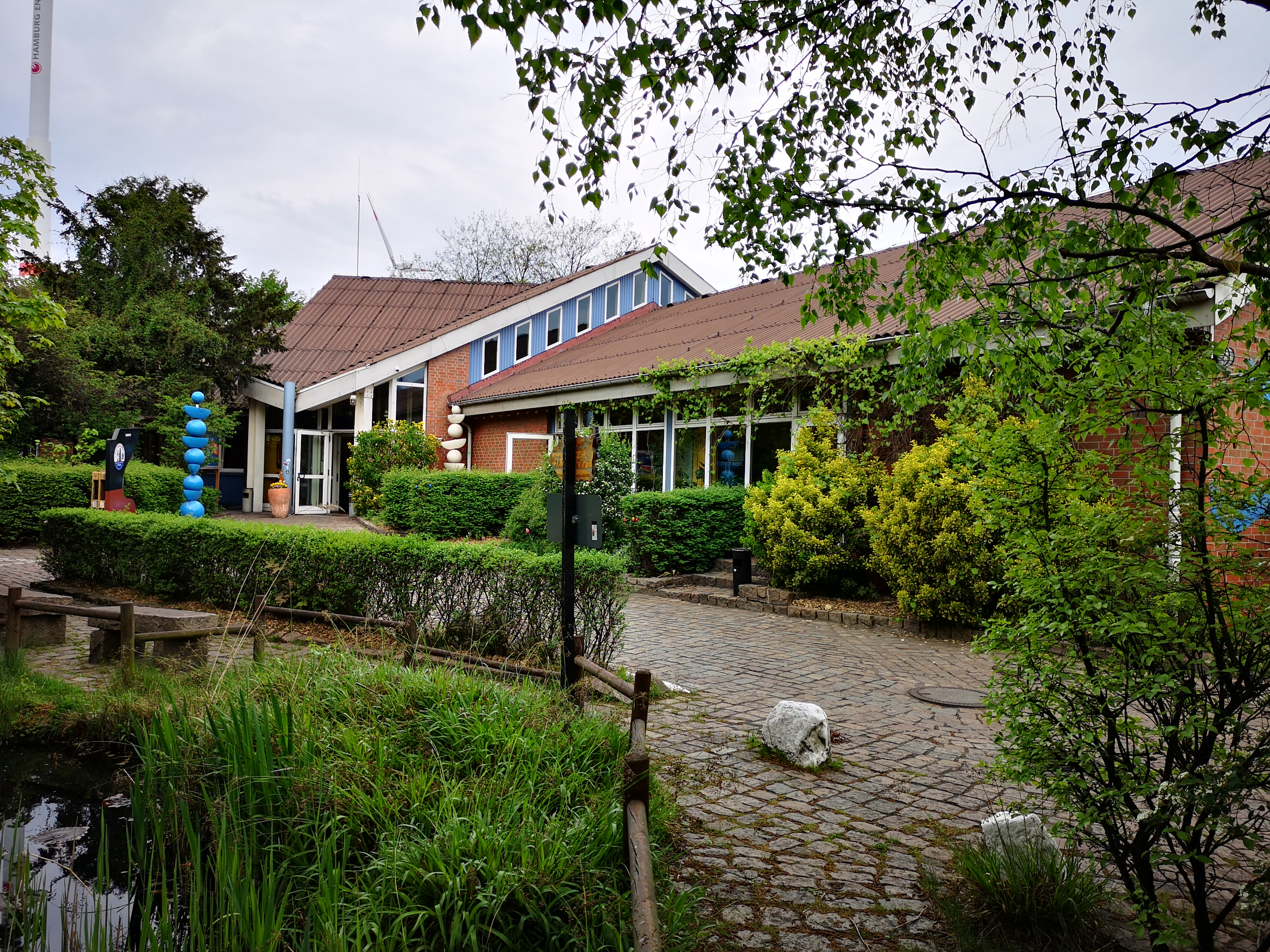 Duckdalben